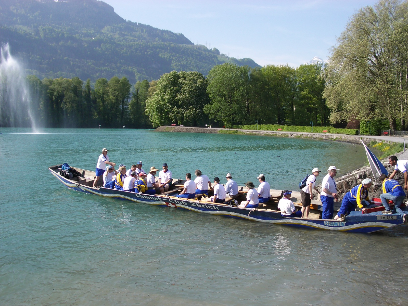 Limmatclub ZH, Switzerland